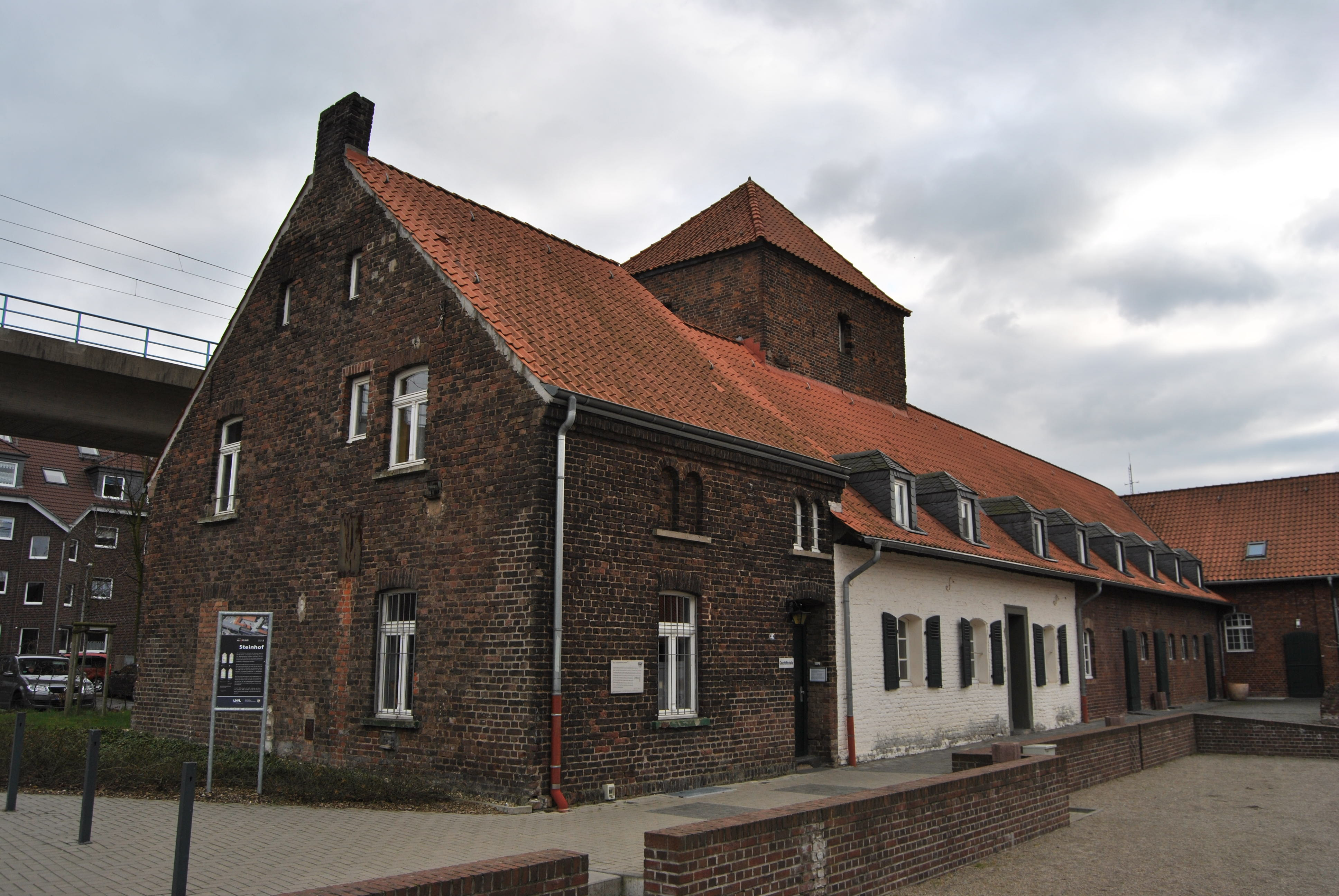 This photograph was taken with a Nikon D3000 This image shows a heritage building in Germany, located in the North Rhine-Westphalian city Duisburg. Aeltester Teil (12. Jh.) des Steinhofes, Bau- und Bodendenkmal, in Huckingen, das gleichzeitig auch das aelteste erhaltene Gebaeude auf dem Duisburger Stadtgebiet darstellt - Denkmalliste Duisburg, Nr. 79 - Koordinaten: 51.21'45.86"N, 6.45'0.9"E, Blickrichtung S